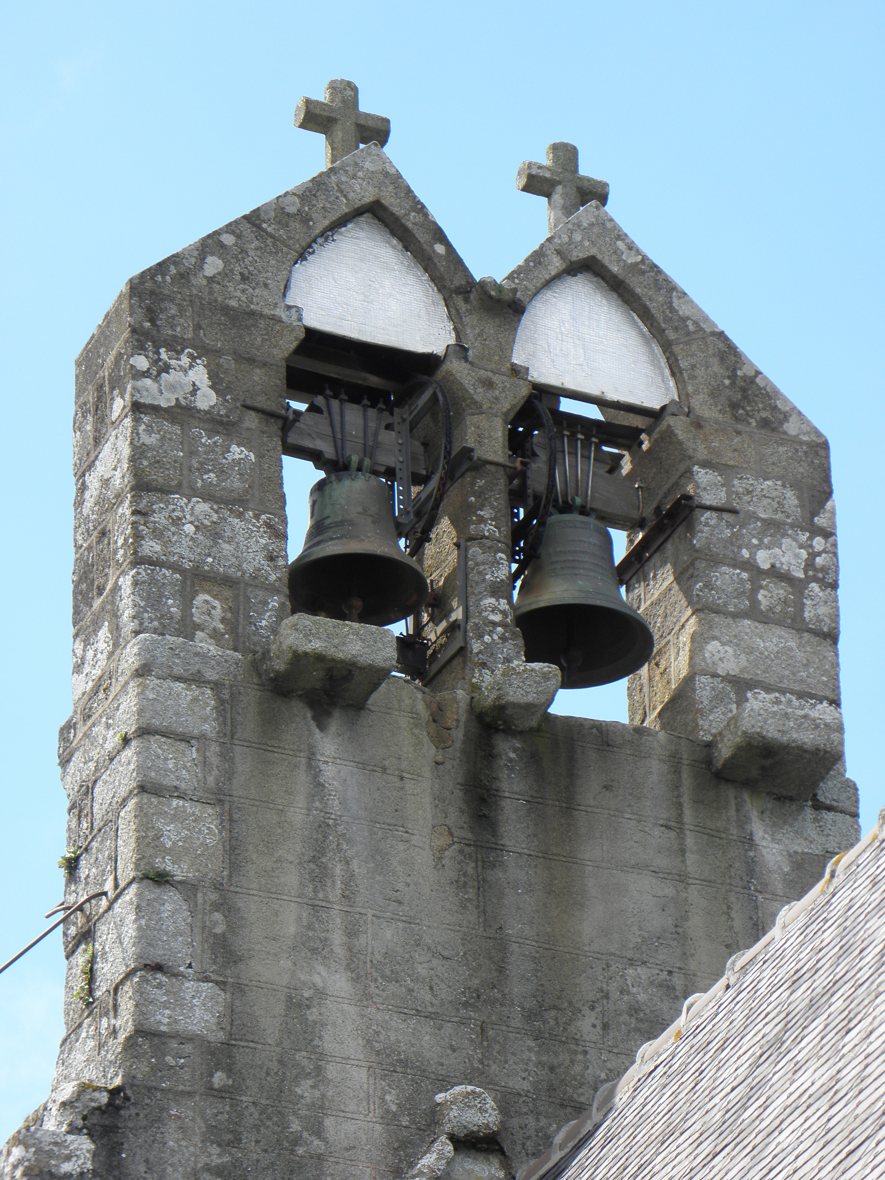 Extérieur de l'église Saint-Georges de Saint-Georges-de-Gréhaigne (35). Clocher-peigne vu de l'est.